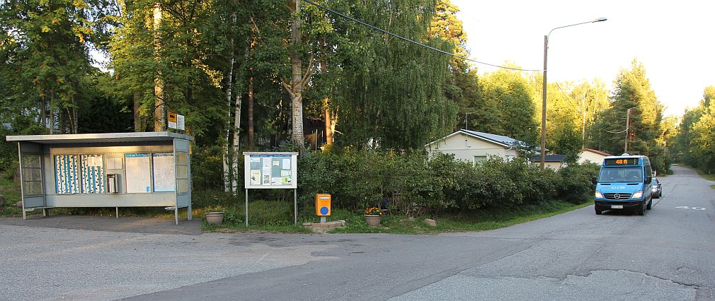 Korpitien bussibysäkki ja linjan 48 A pikkubussi, Vantaan Petaksen asuinalueella. Huom: Muista säilyttää viittaus kuvaajaan, mikäli käytät kuvaa.